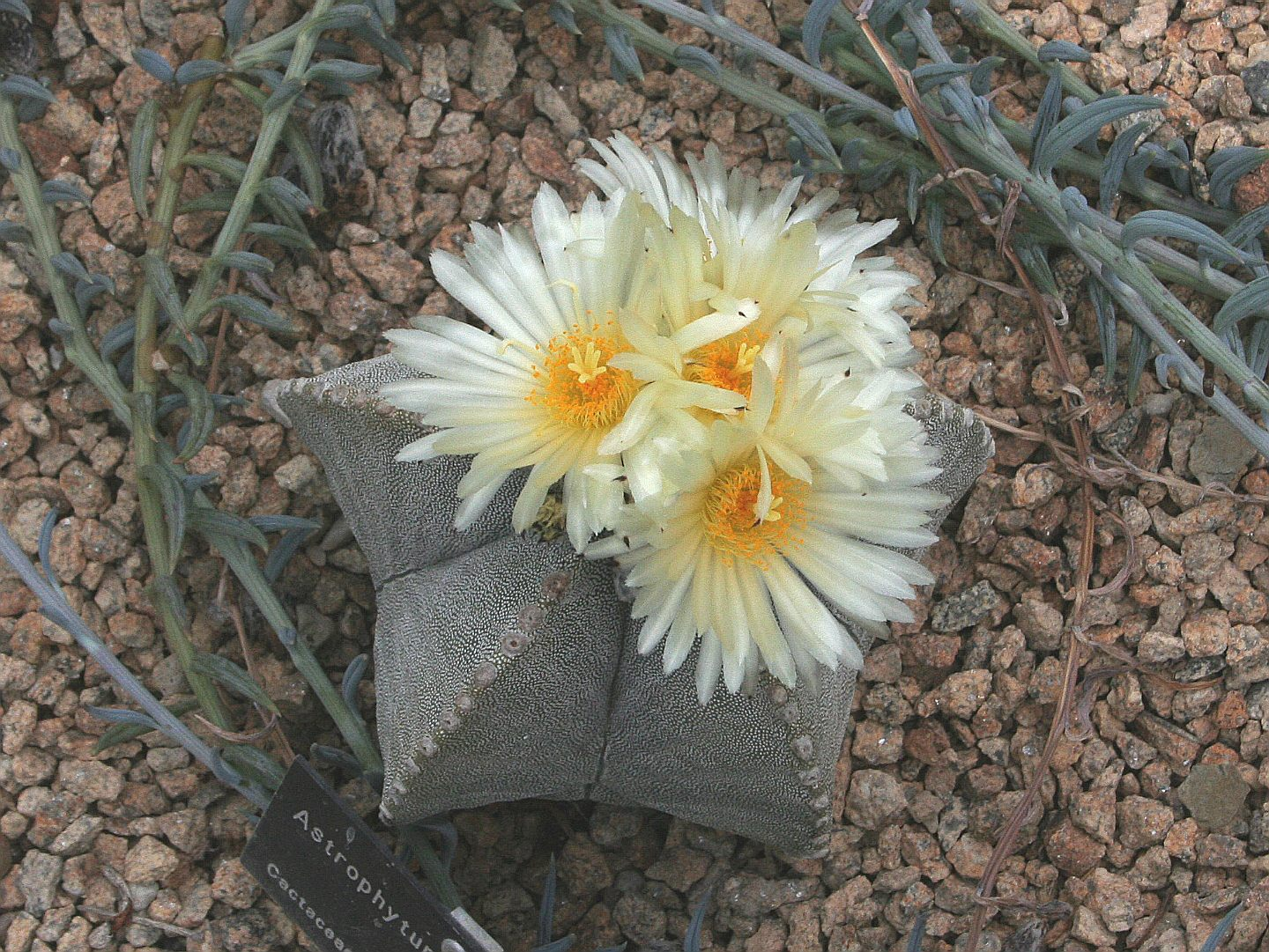 Astrophytum myriostigma Conservatoire botanique national de Brest, France, juin 2007